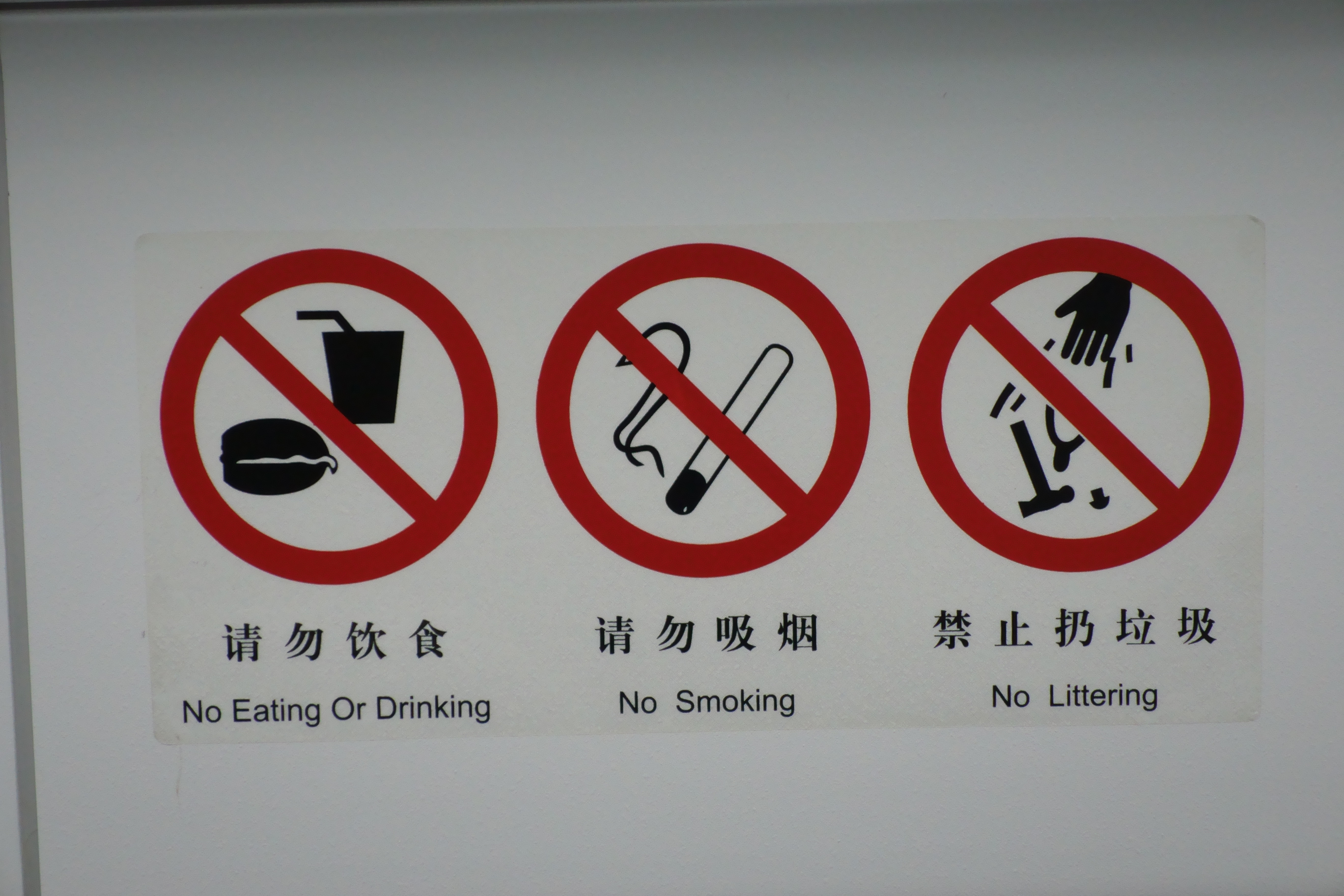 宁波轨道交通禁食标志